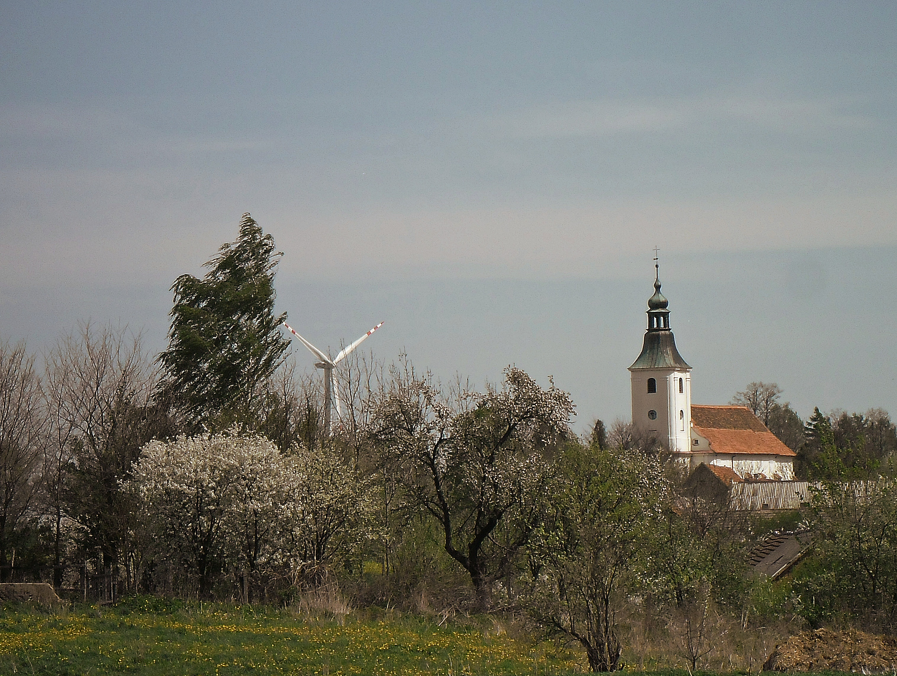 kościół par. p.w. św. Marcina, 1775 Lipniki, Kamiennik 02.1966.